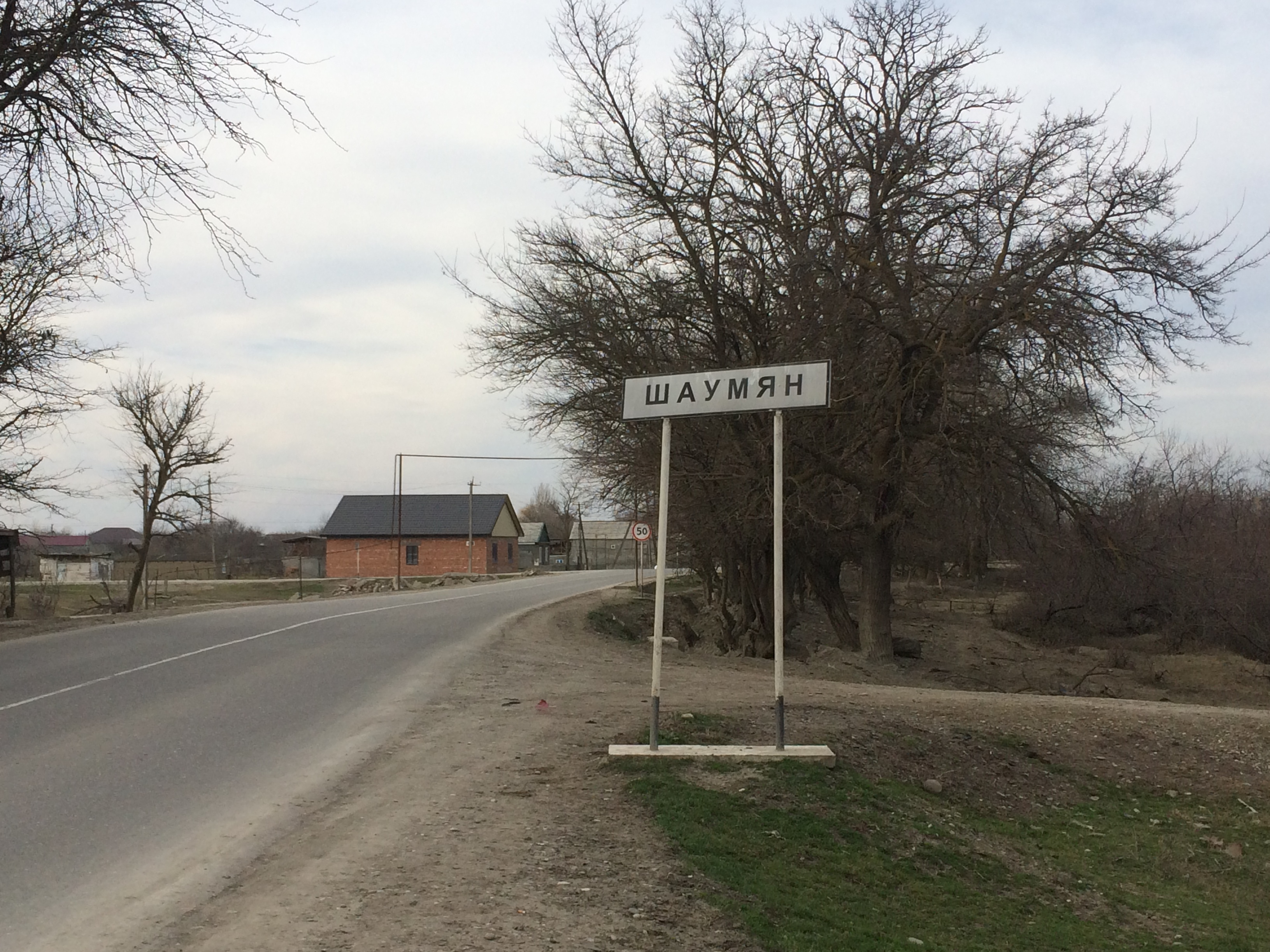 на въезде в село со стороны города Кизляра